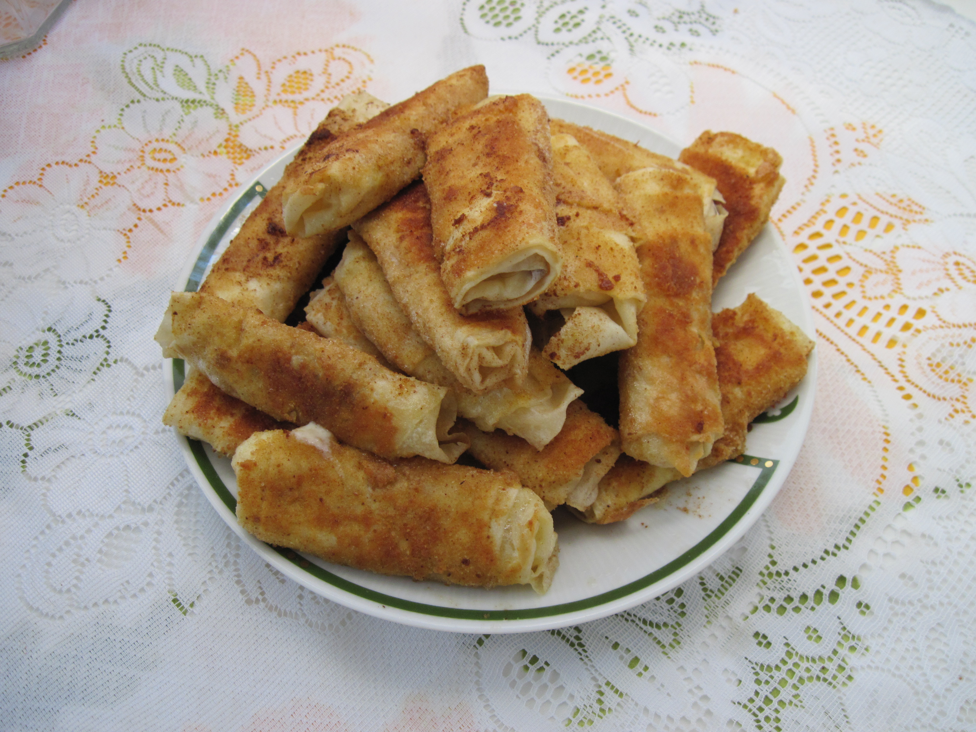 Paçanga böreği